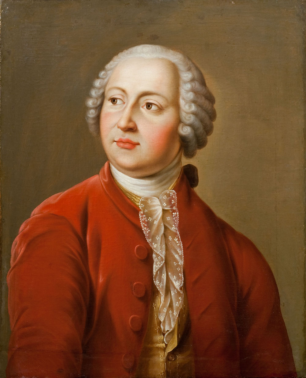 Михаил Ломоносов